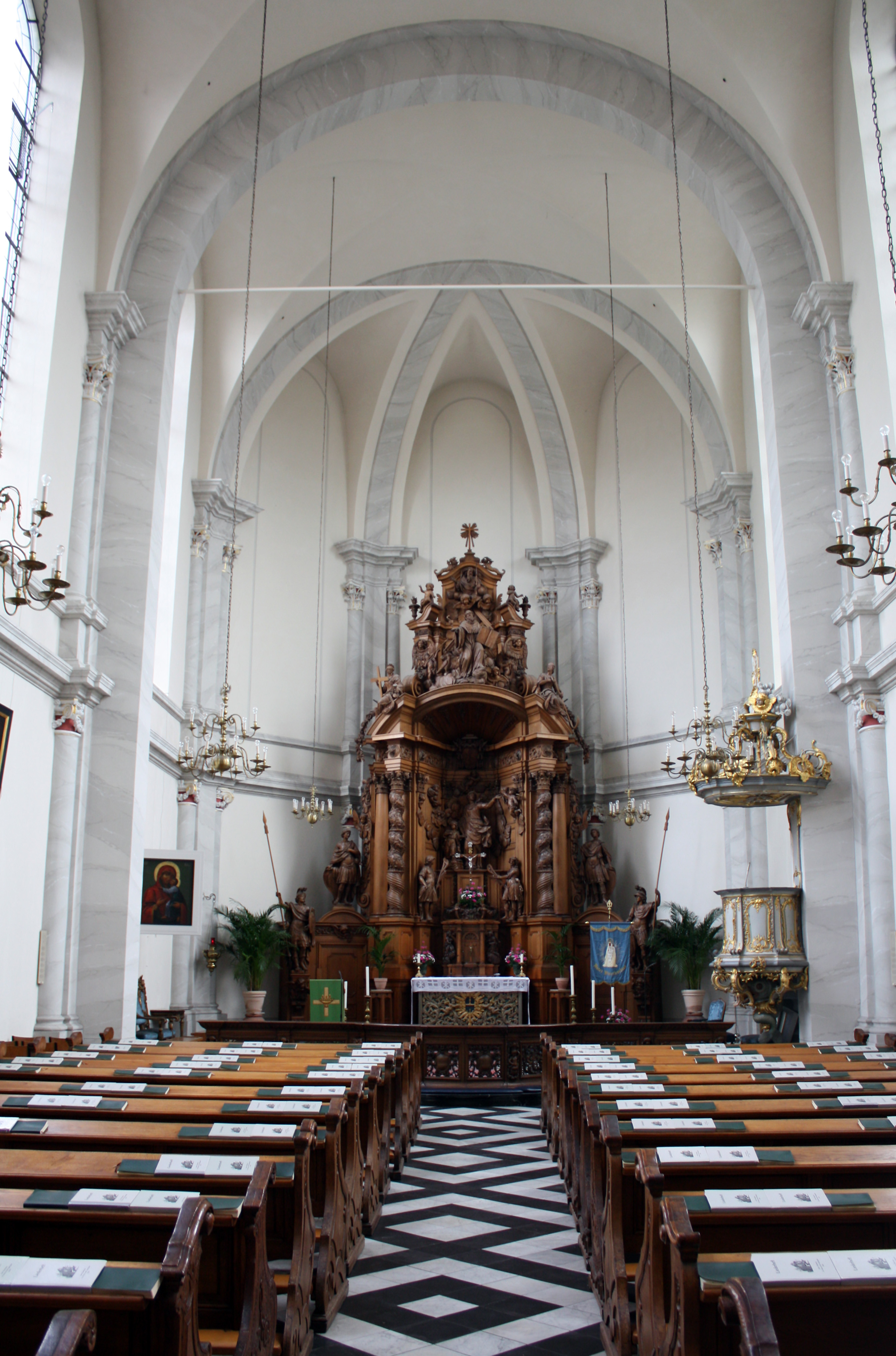 Köln, St. Maria in der Kupfergasse Langschiff